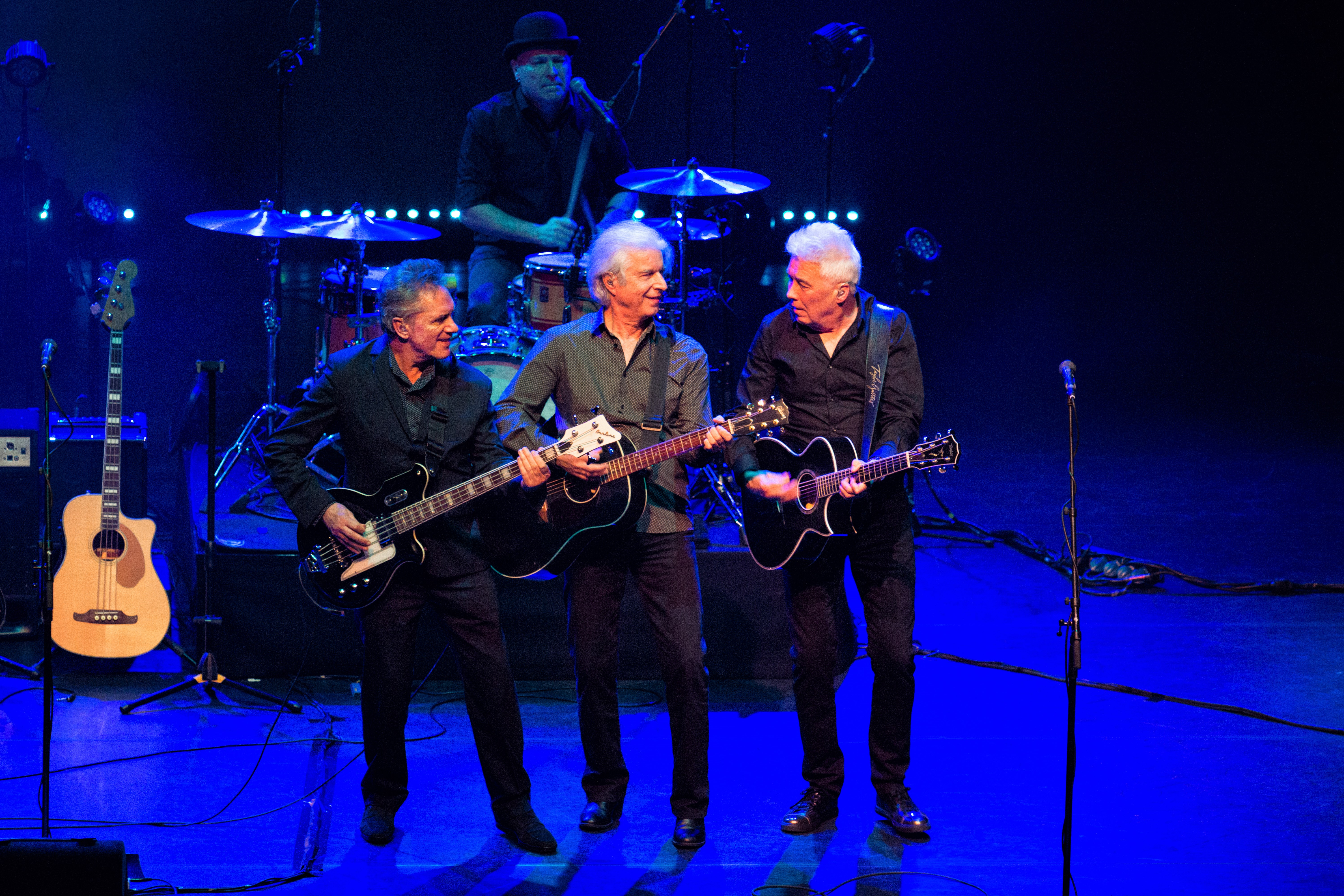 Vreemde Kostgangers, optreden in Orpheus Theater in Apeldoorn